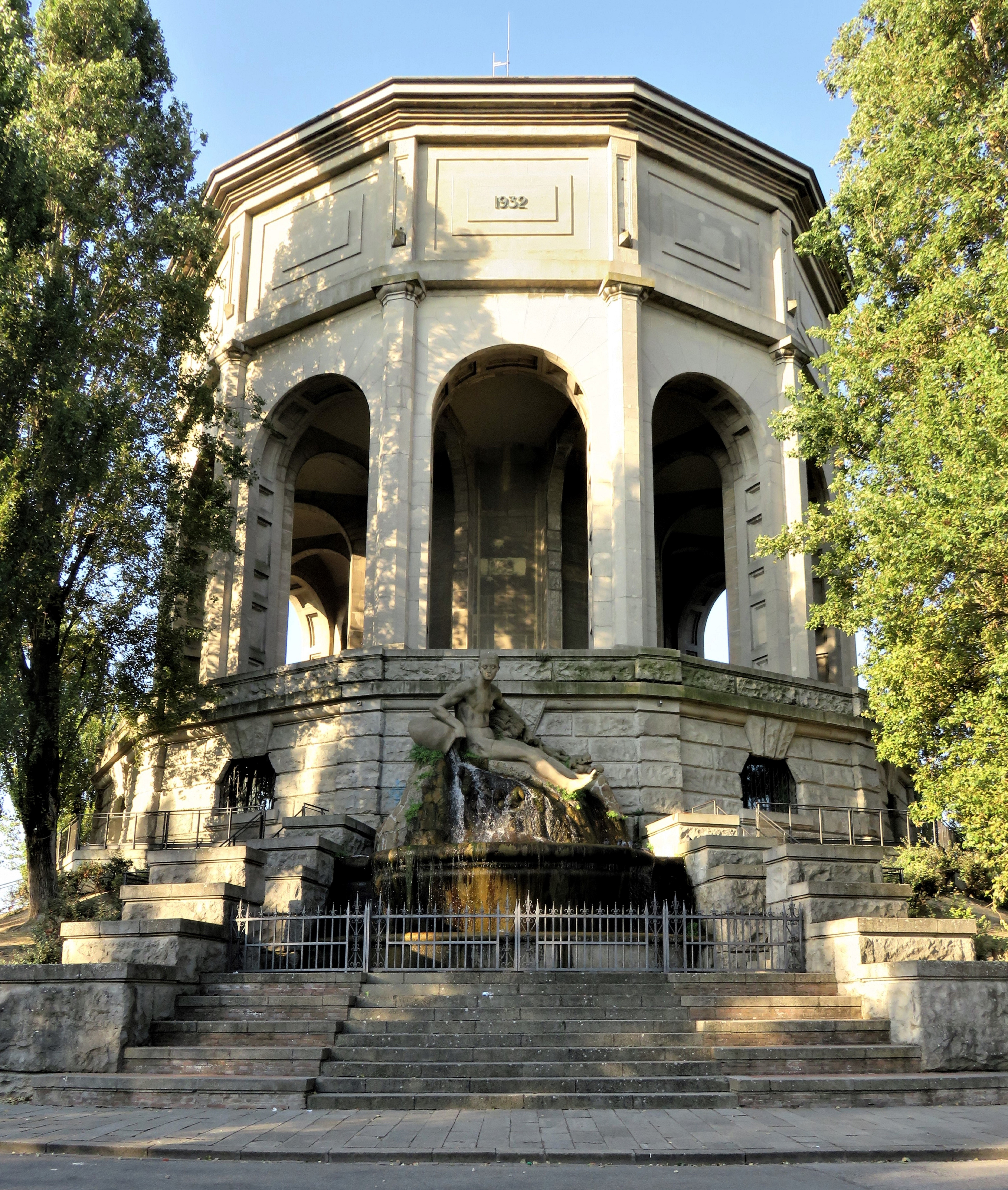 Acquedotto monumentale di Ferrara, prospetto principale con fontana.